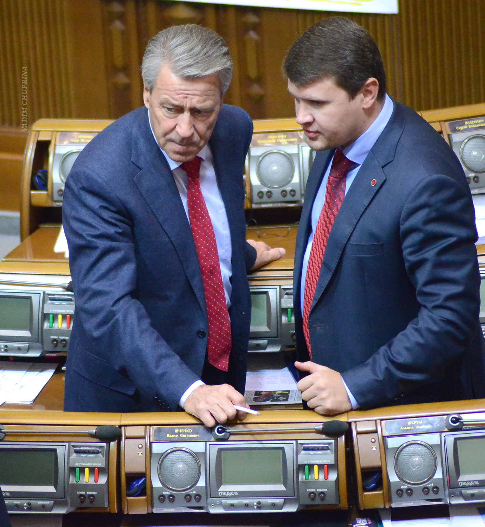 Кириленко И. Г. и Ивченко В. Е., в Верховной Раде Украины 2016 год. фото Чуприна Вадим. А